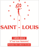 Logo du 120ème anniversaire du Collège (2012)